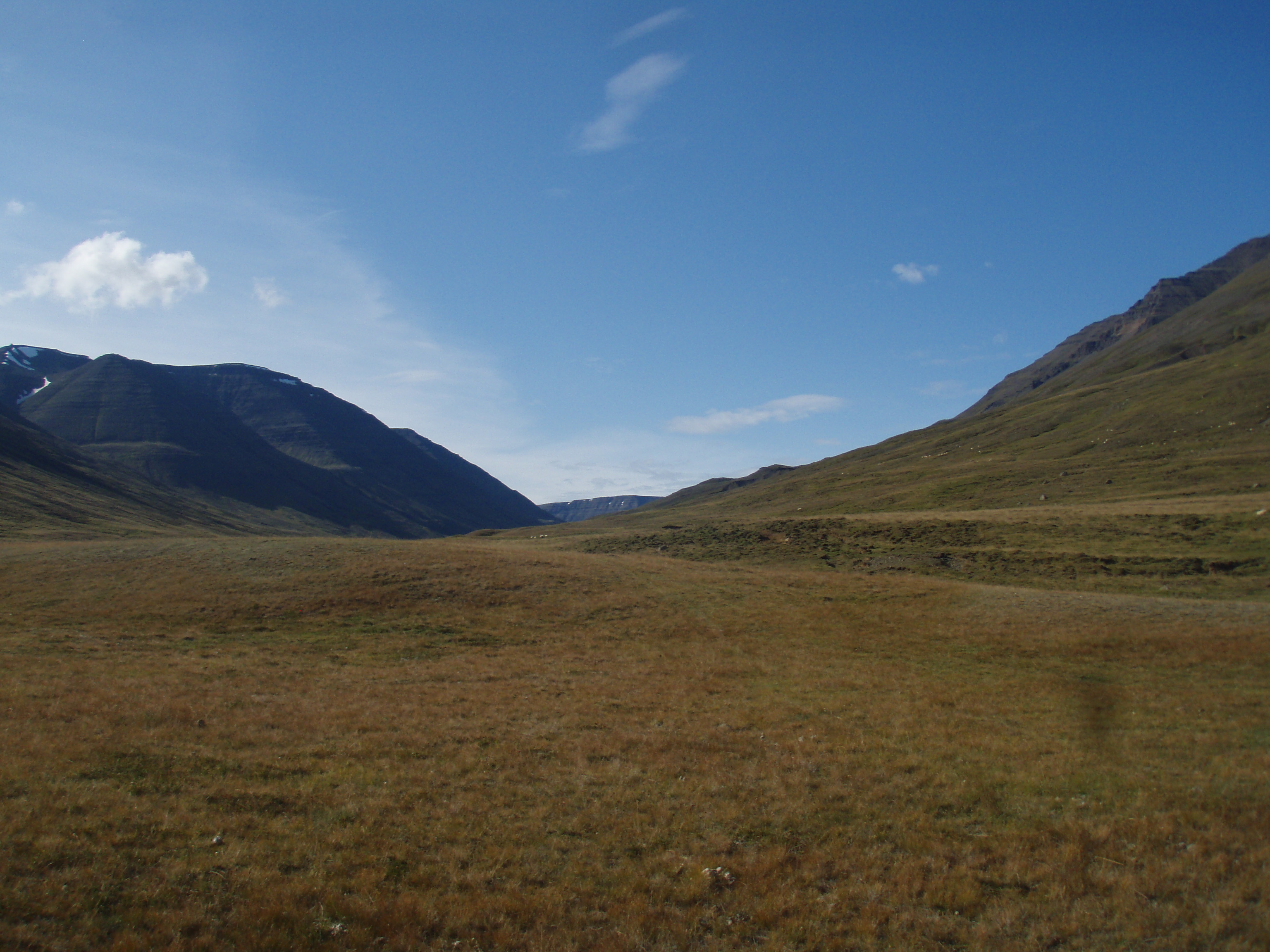 Séð inn Skjóldal